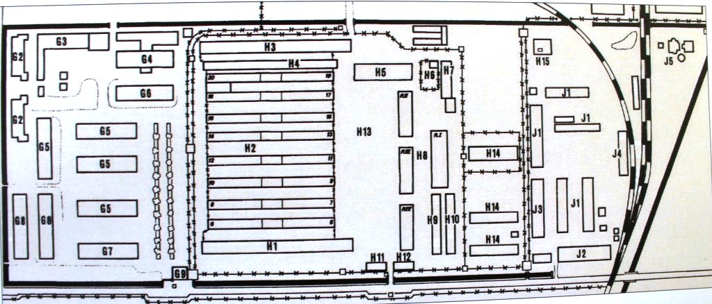 Lagerplan vom KZ Neuengamme